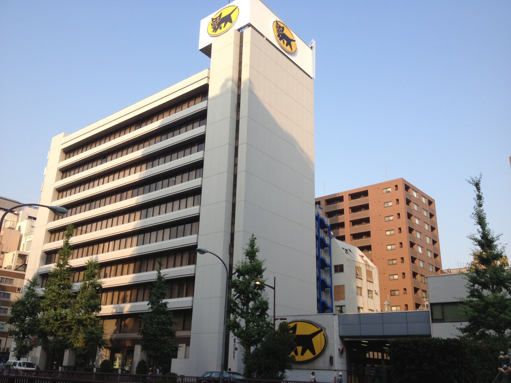 ヤマト銀座ビルと京橋ハブ